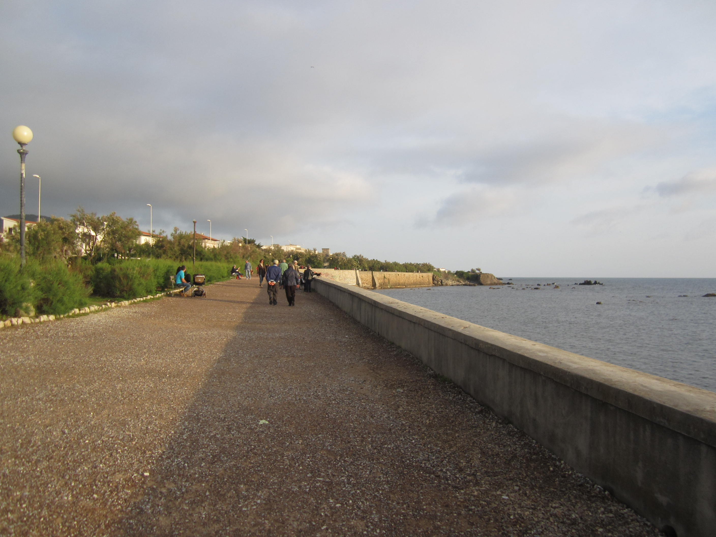 Lungomare di Livorno presso Antignano